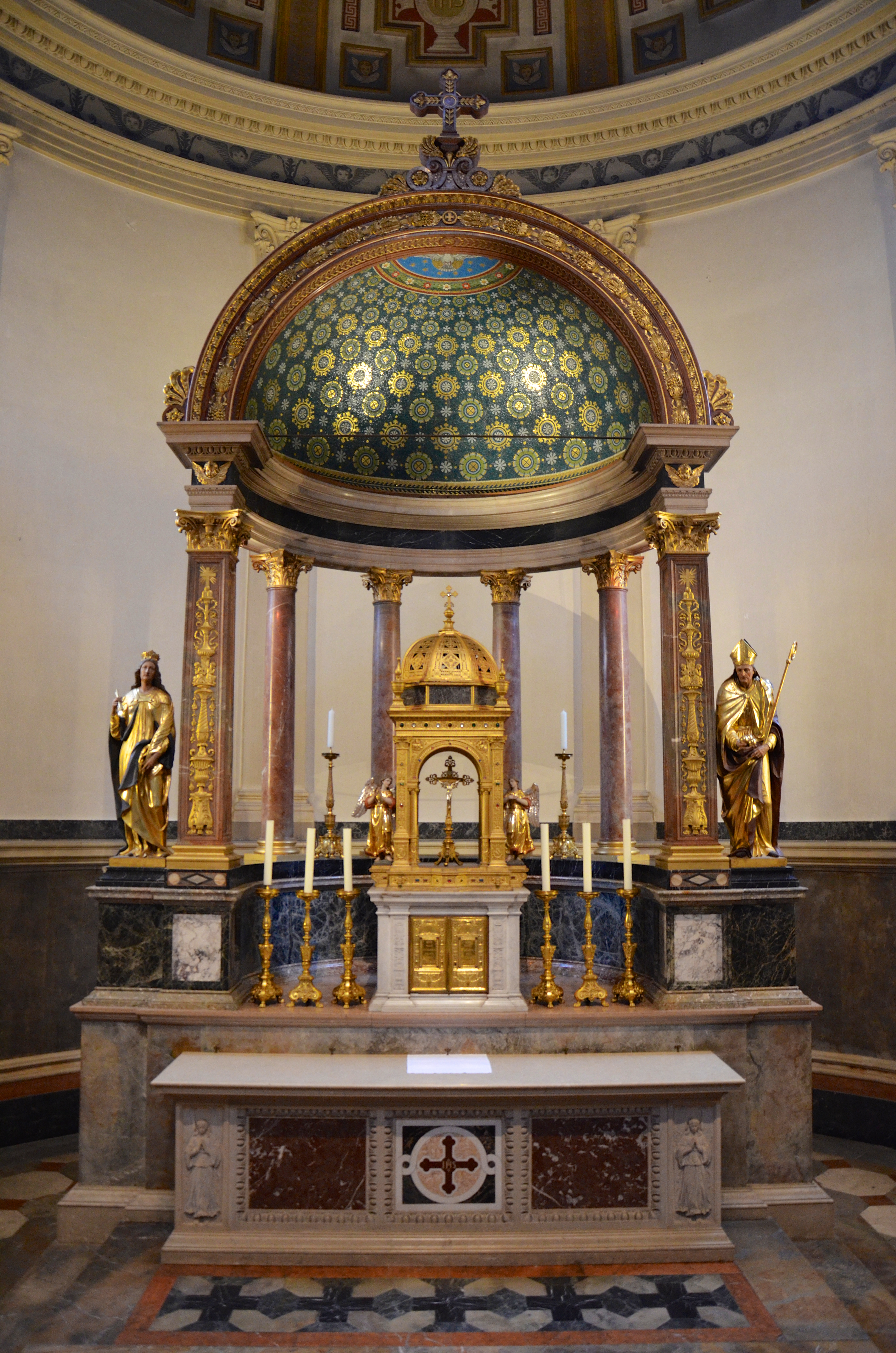 Pfarrkirche Sankt Ursula in München Schwabing am Kaiserplatz 1